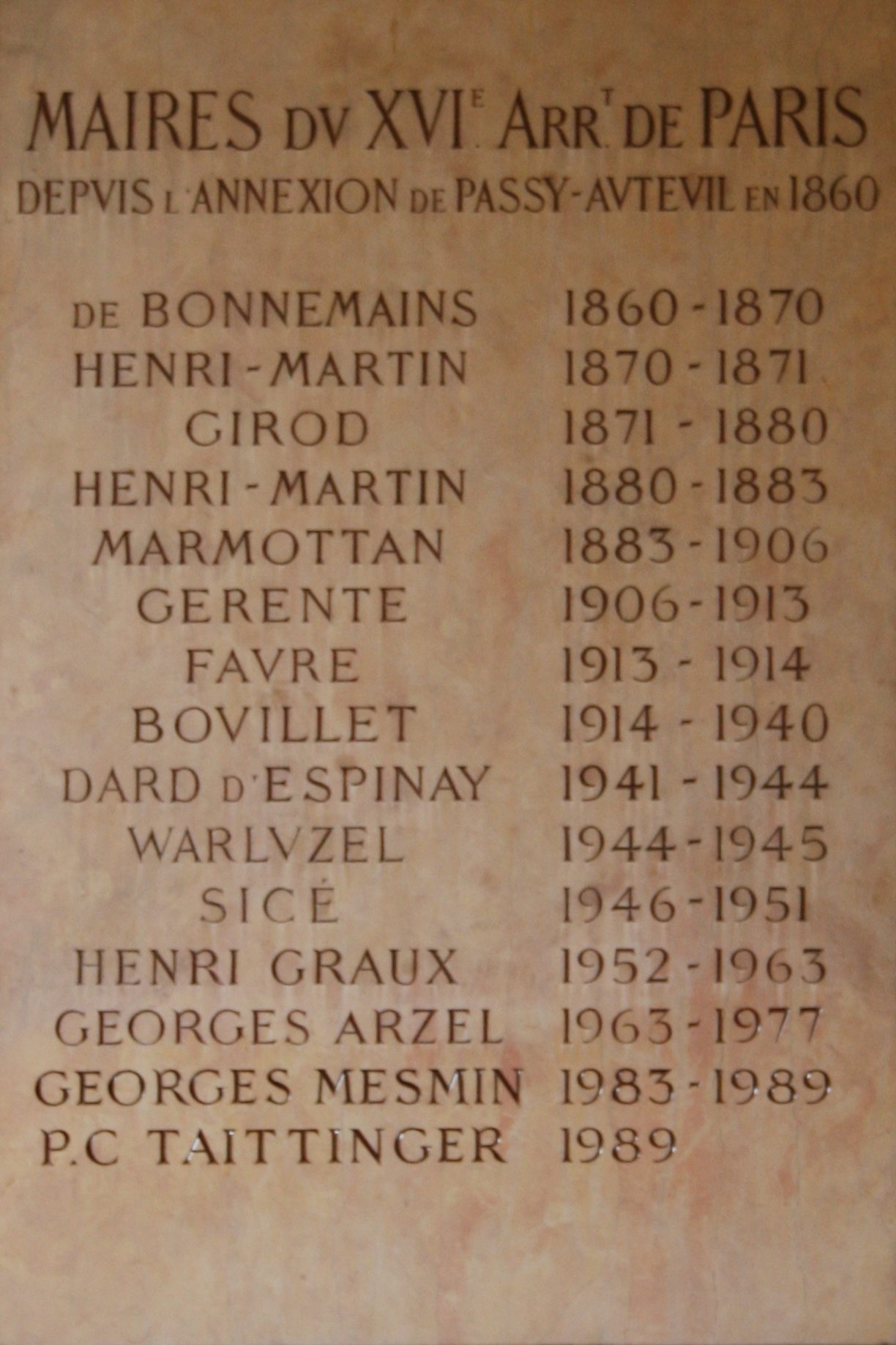 Maires du XVIème arrondissement de Paris